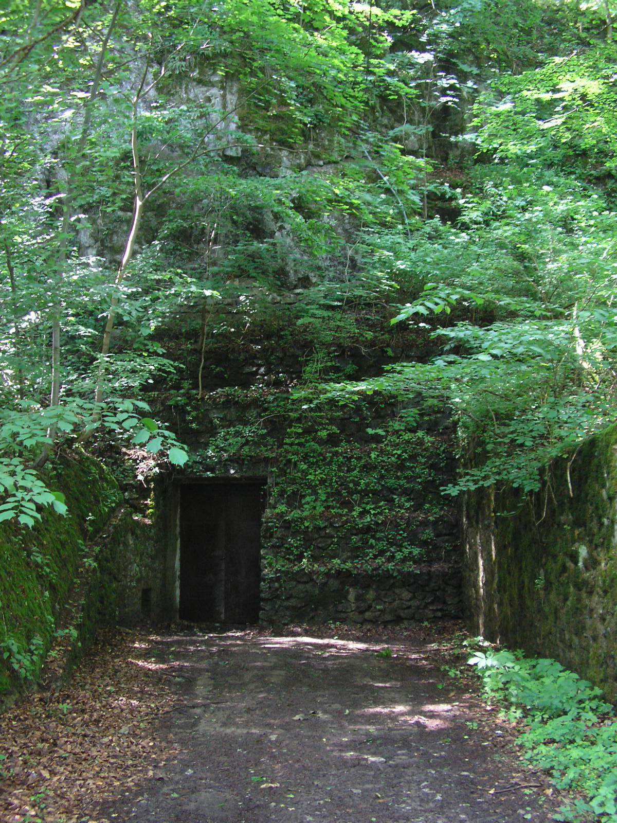 Drátenická jeskyně u Křtin